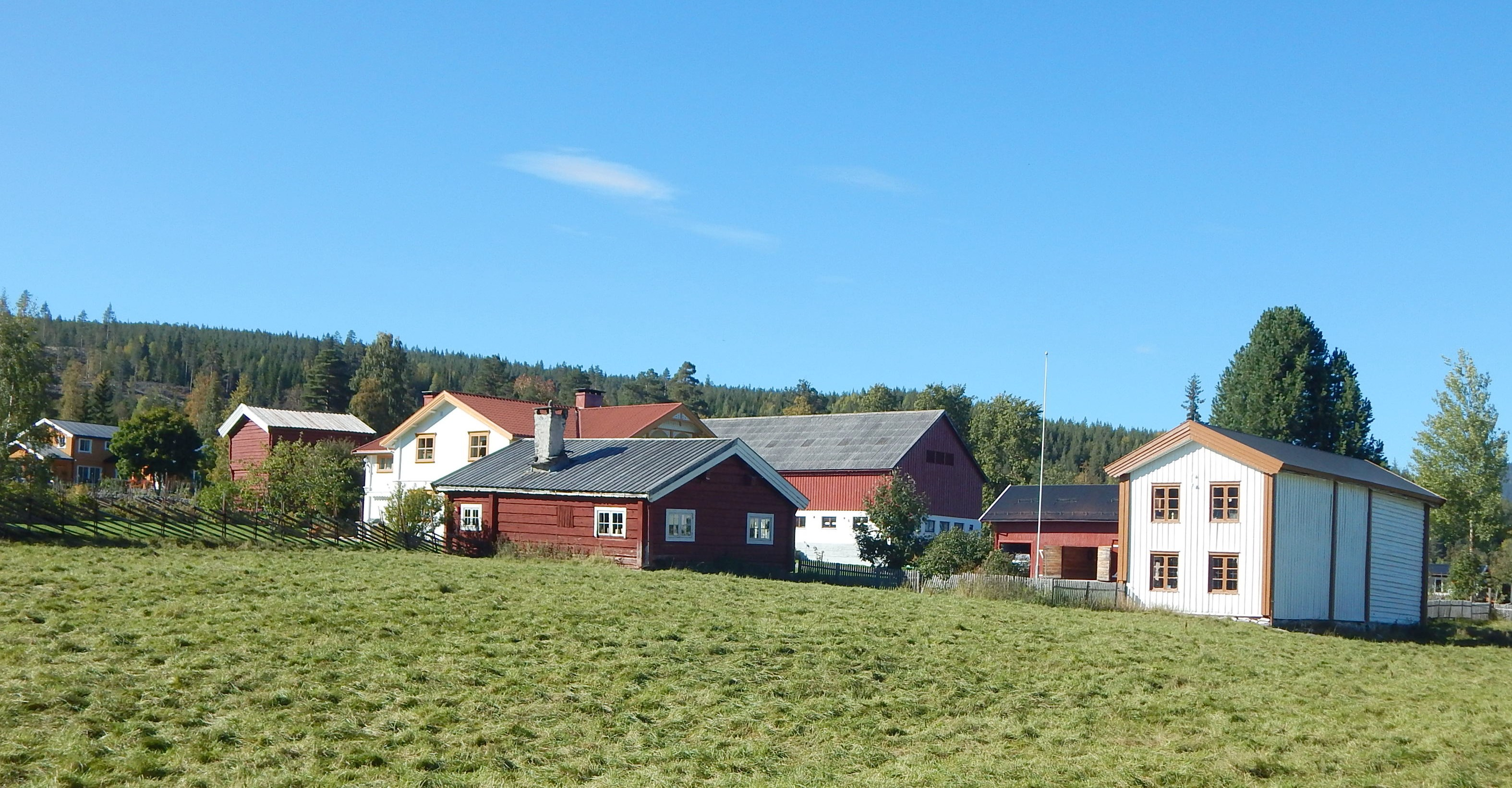 Sørstu Trønnes sett fra Nystu Trønnes